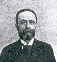 Traduttore italiano, orientalista, professore di persiano, ordinario di filologia indoiranica e lingue semitiche comparate nell'università di Torino.